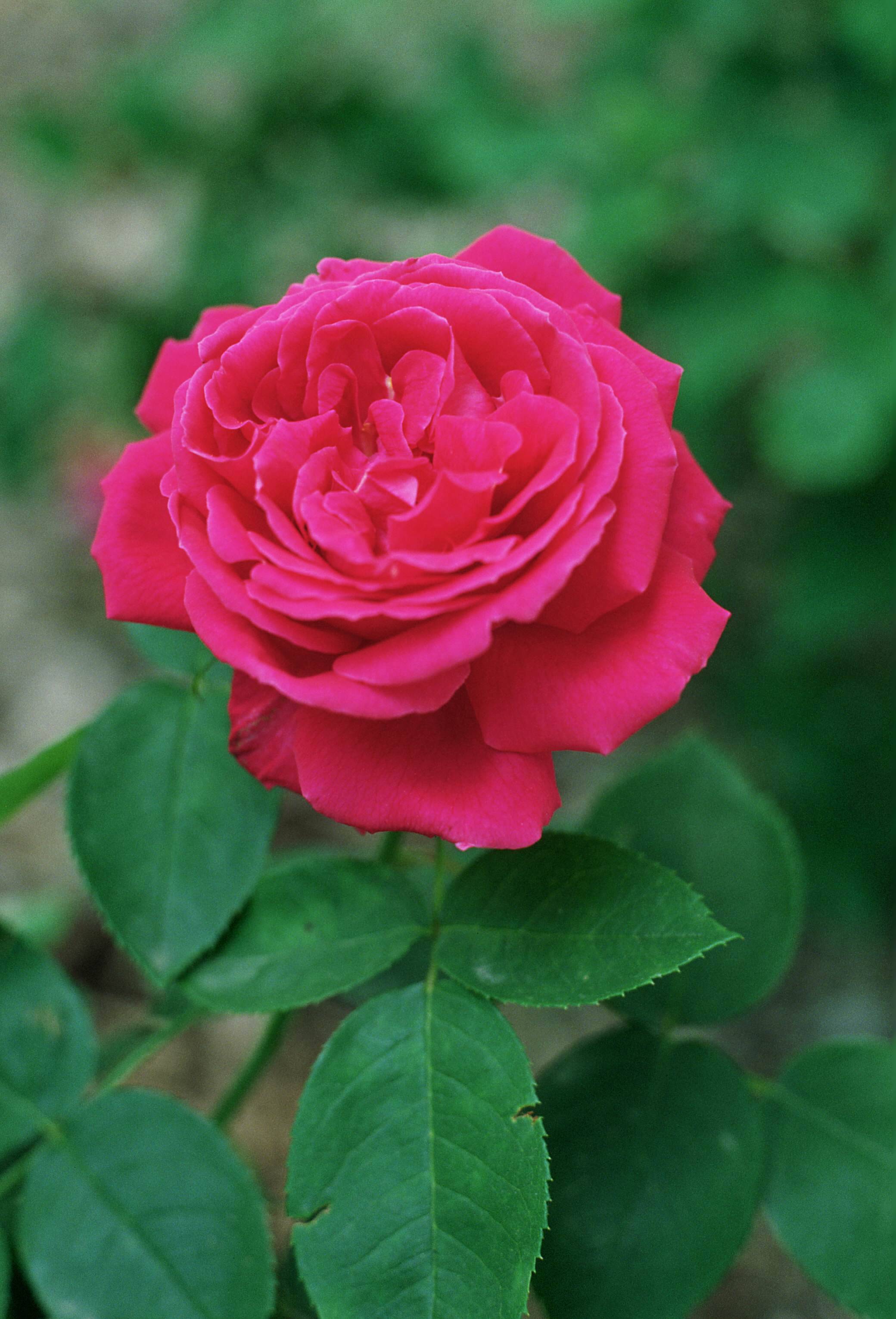 Rosa 'Tom Wood', Híbridos reflorecientes, sect. Rosa. Real Jardín Botánico, Madrid